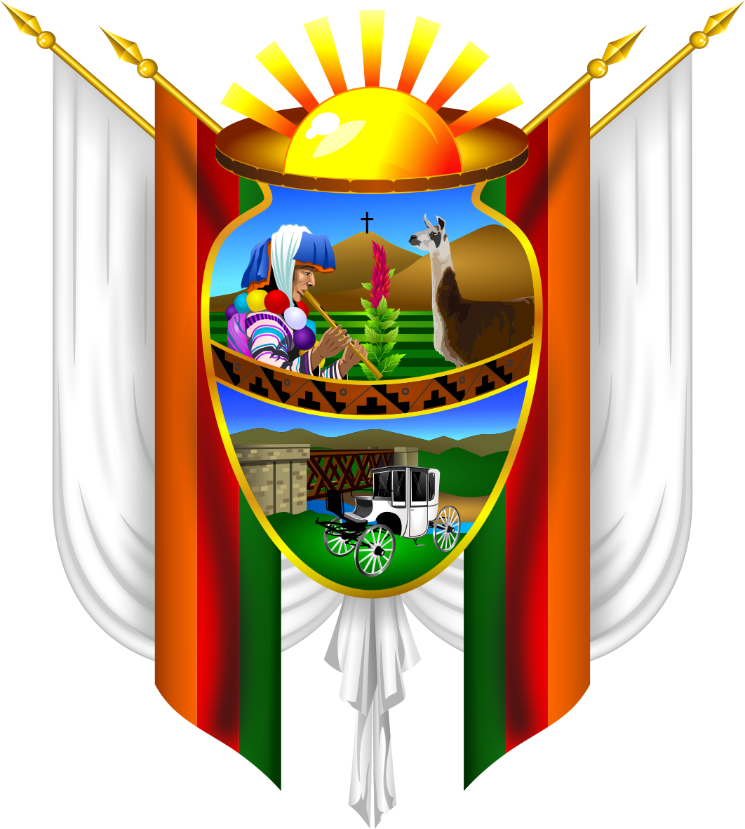 Distrito de Tirapata - Provincia Azángaro - Región Puno